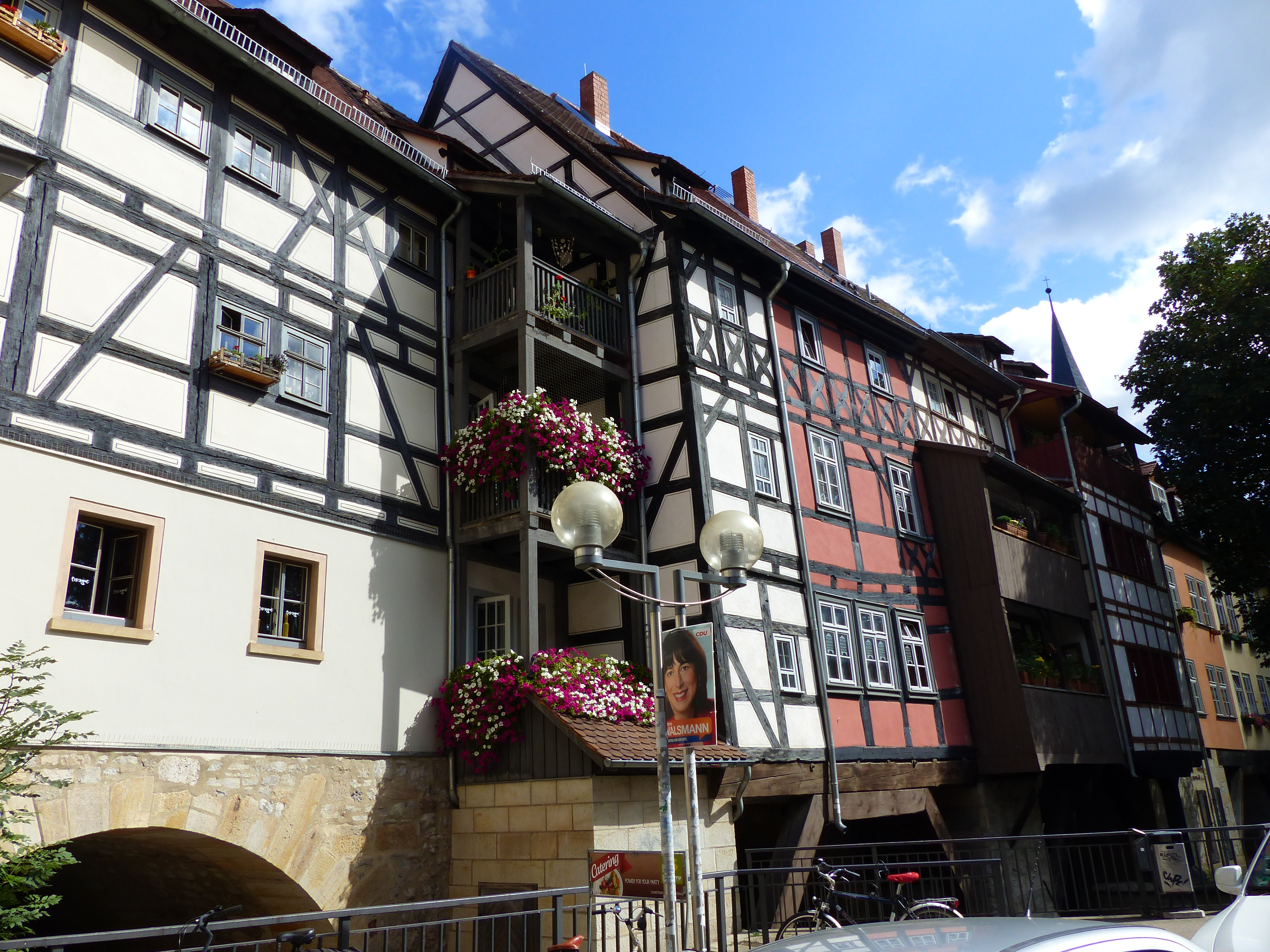 WLM-Fototour Erfurt 2014 Dieses Foto wurde im Rahmen der WLM-Fototour 2014 in Erfurt erstellt, die vom 29. bis 31. August 2014 zum Auftakt des Wettbewerbs Wiki Loves Monuments 2014 statt fand. The making of this document was supported by the Community-Budget of Wikimedia Germany. Krämerbrücke in Erfurt